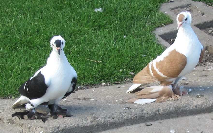 Saxon Wing Pigeon